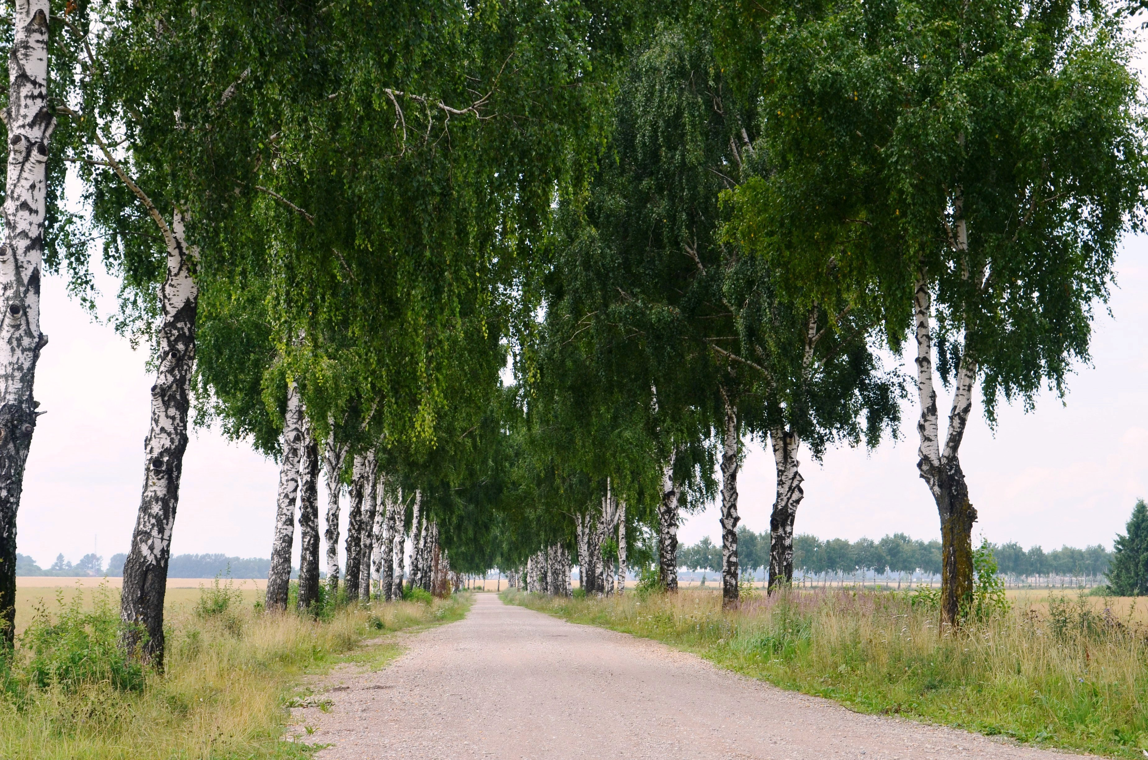 Beržų alėja nuo Beržų k. iki Gėlainių k., Kėdainių raj.